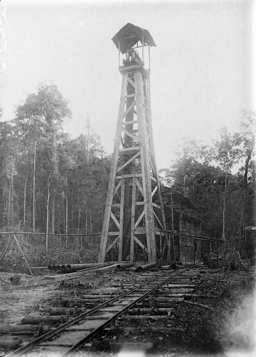 Repronegatief. Boortoren van de B.P.M. op het eiland Tarakan